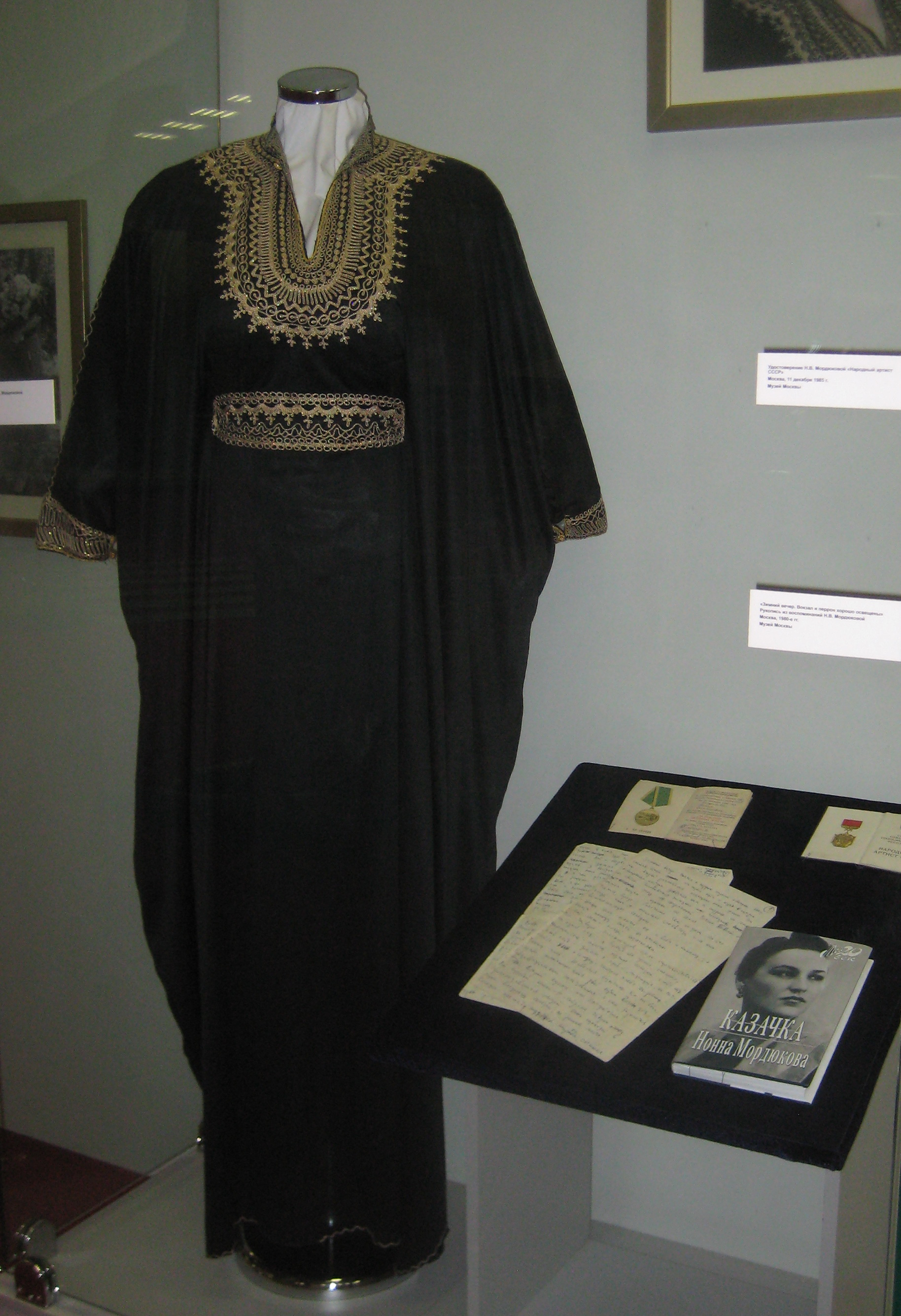 Музей Москвы (Провиантские склады)